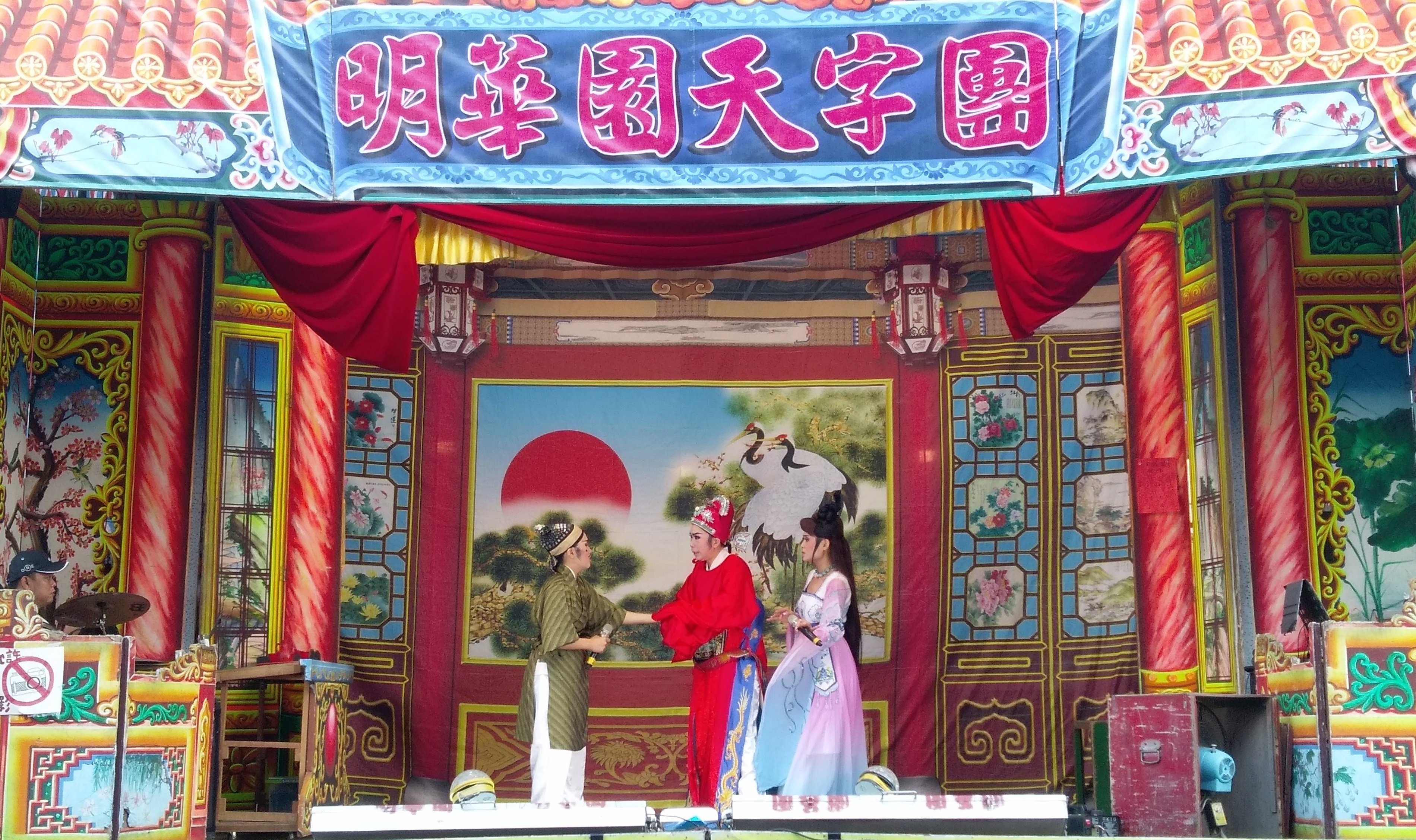 中文（台灣）: 媽祖廟前上演祝壽歌仔大戲